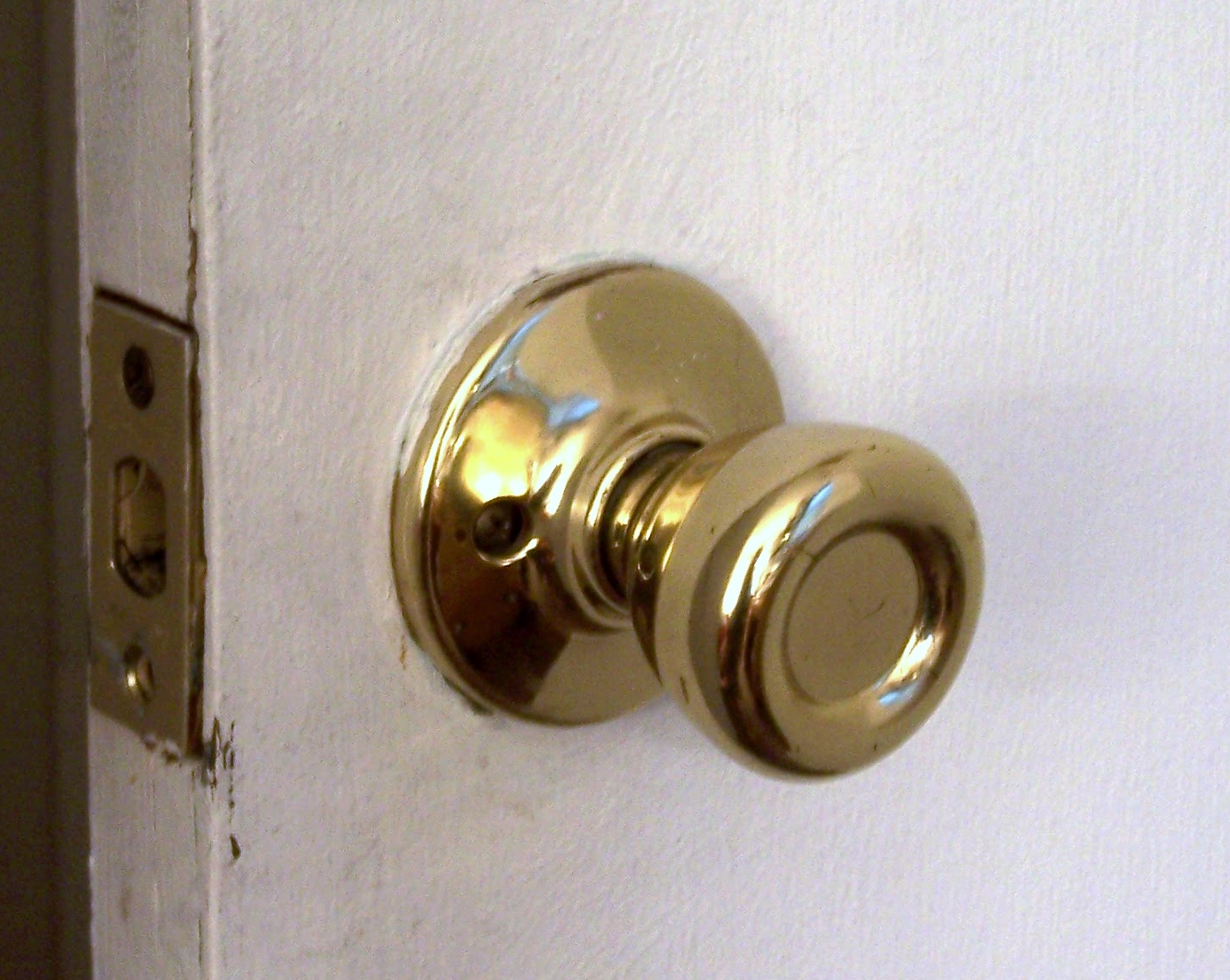 See Image:Gold doorknob.jpg